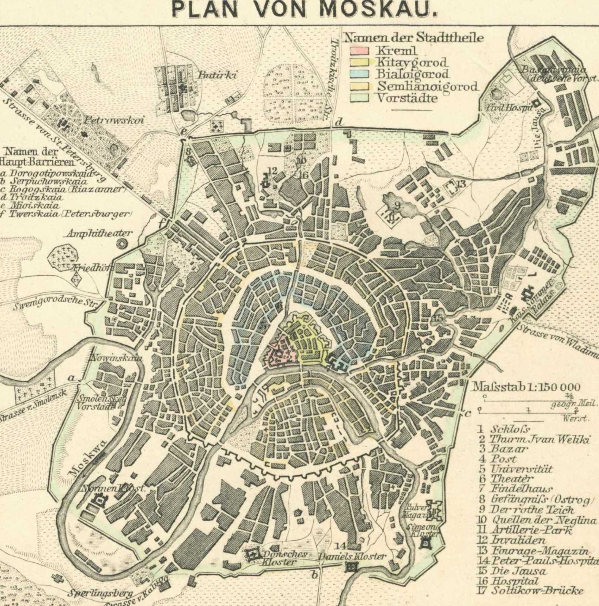 Plan von Moskau um 1812